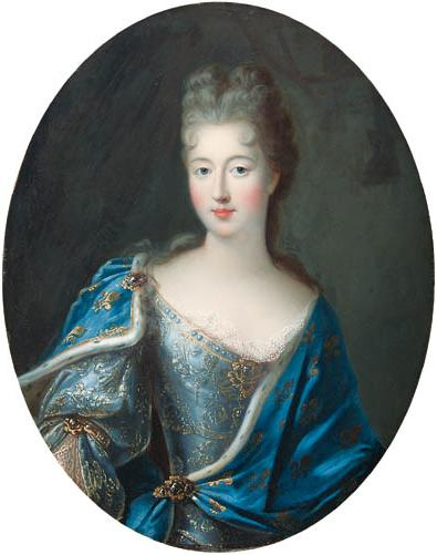 Françoise-Marie de Bourbon (1677-1749), Légitimée de France, daughter of Louis XIV and Madame de Montespan; as Duchess of Chartres (1692-1701)